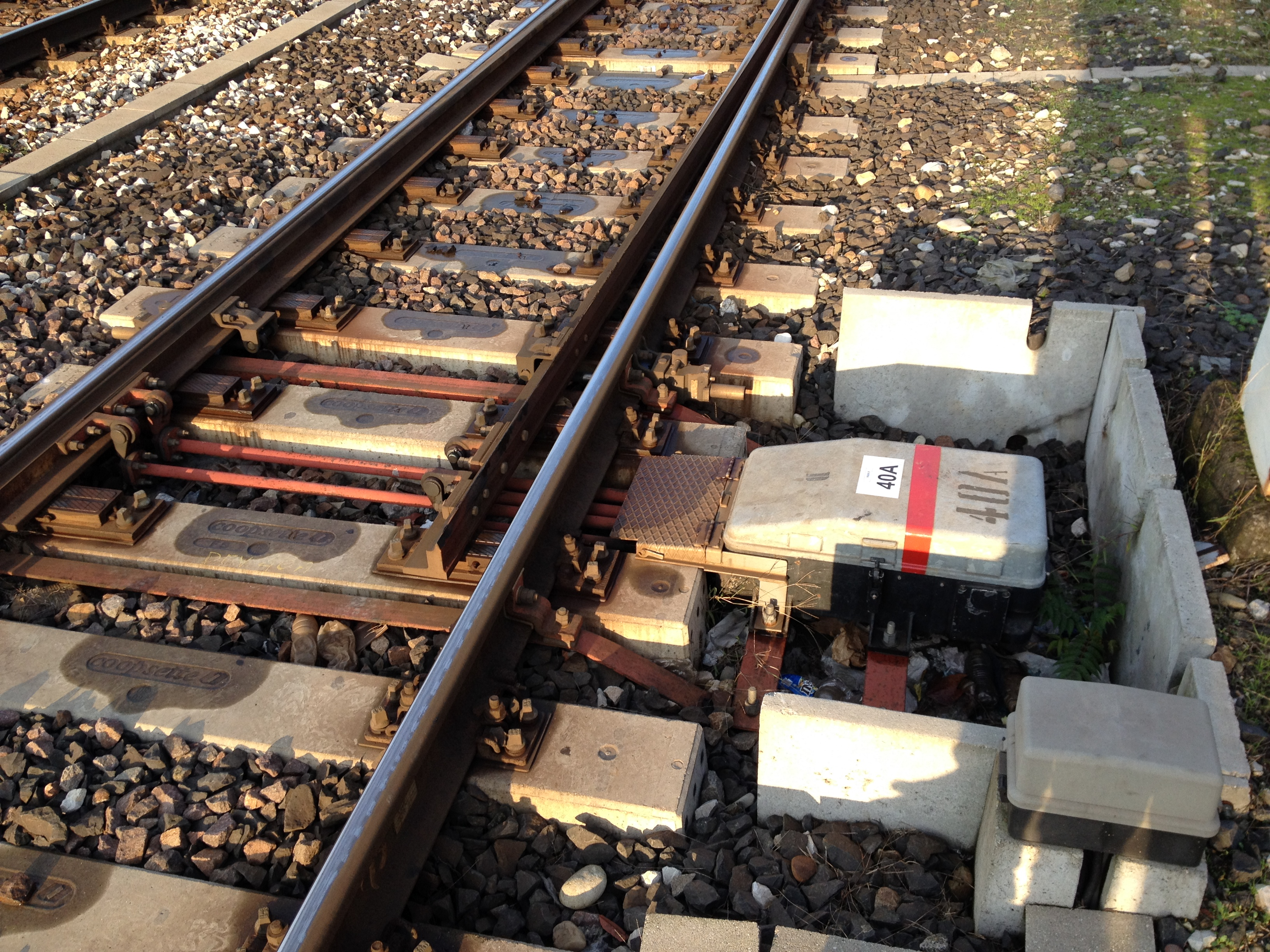 Cassa di manovra di un deviatoio; stazione di Pavia